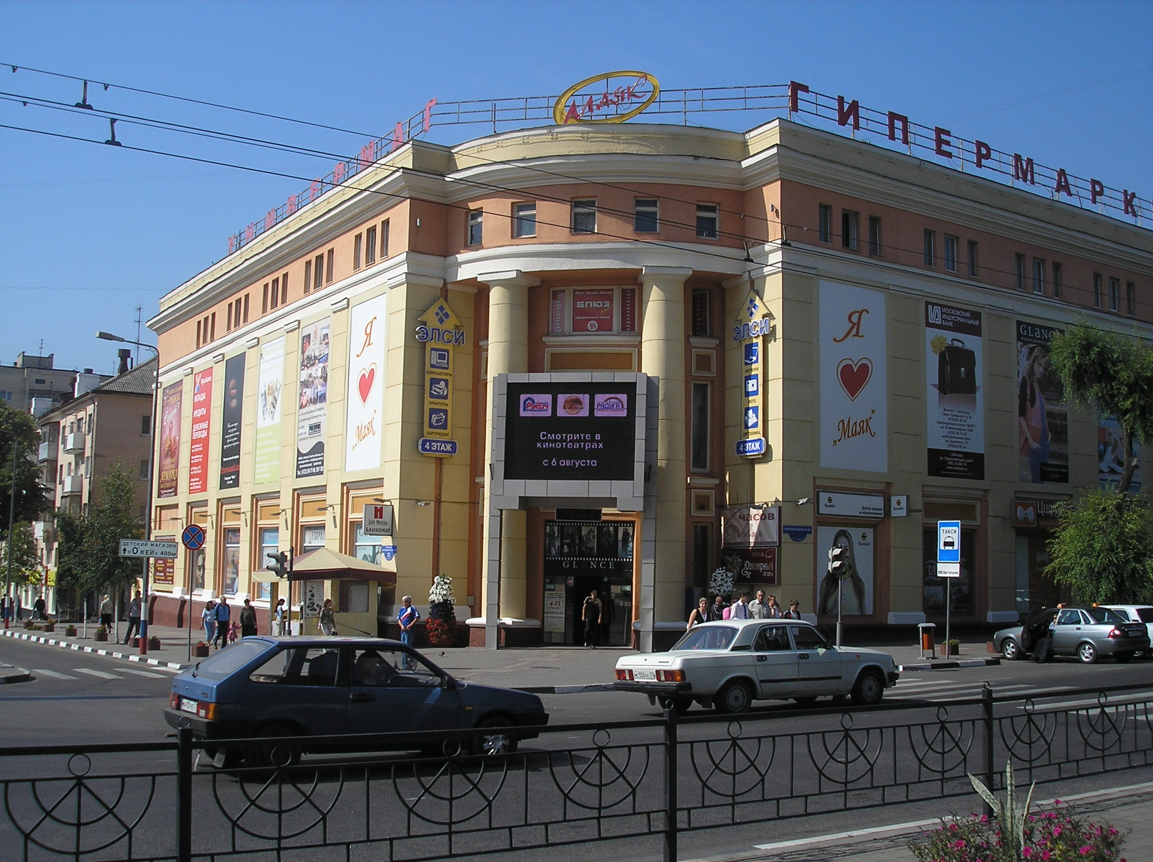 Универмаг Маяк (г. Белгород)